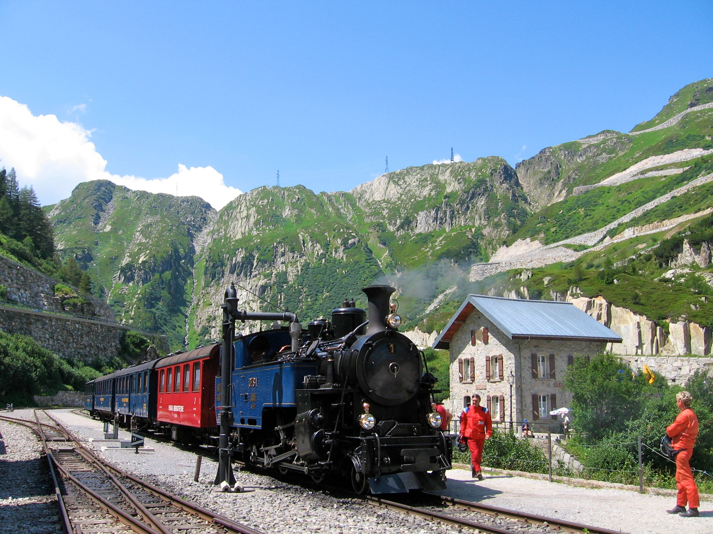 Steam train in Gletsch, Valais